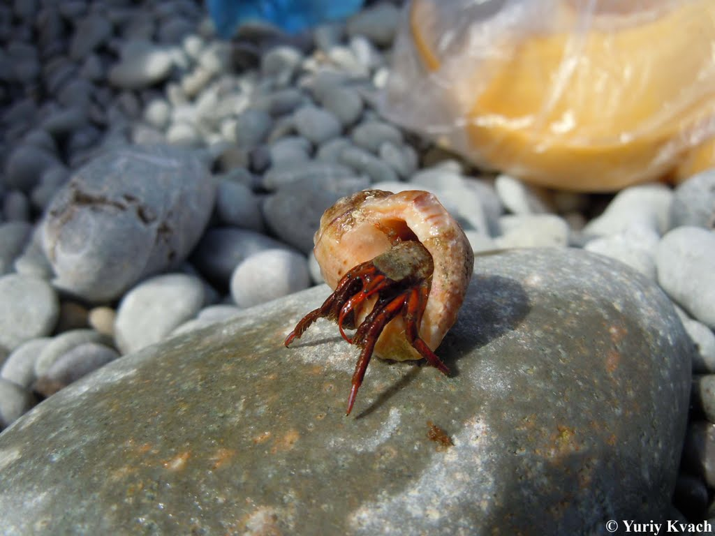 Clibanarius erythropus з Чорного моря (околиці Ялти), Україна